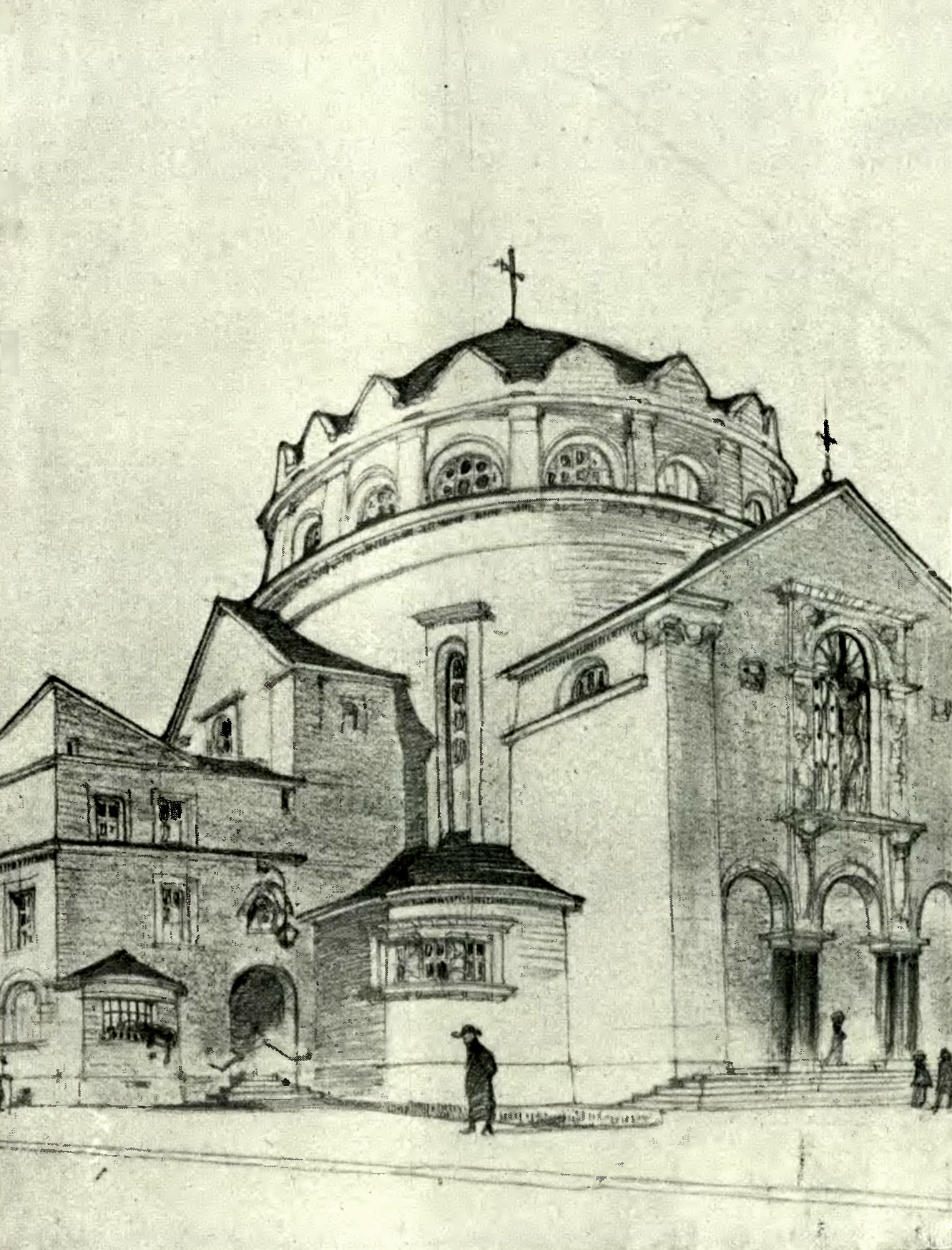 Конкурсний проект нового костелу святої Анни. 1912 рік. Архітектори Владислав Дердацький (1882—1951), Вітольд Мінкевич (1880—1961).